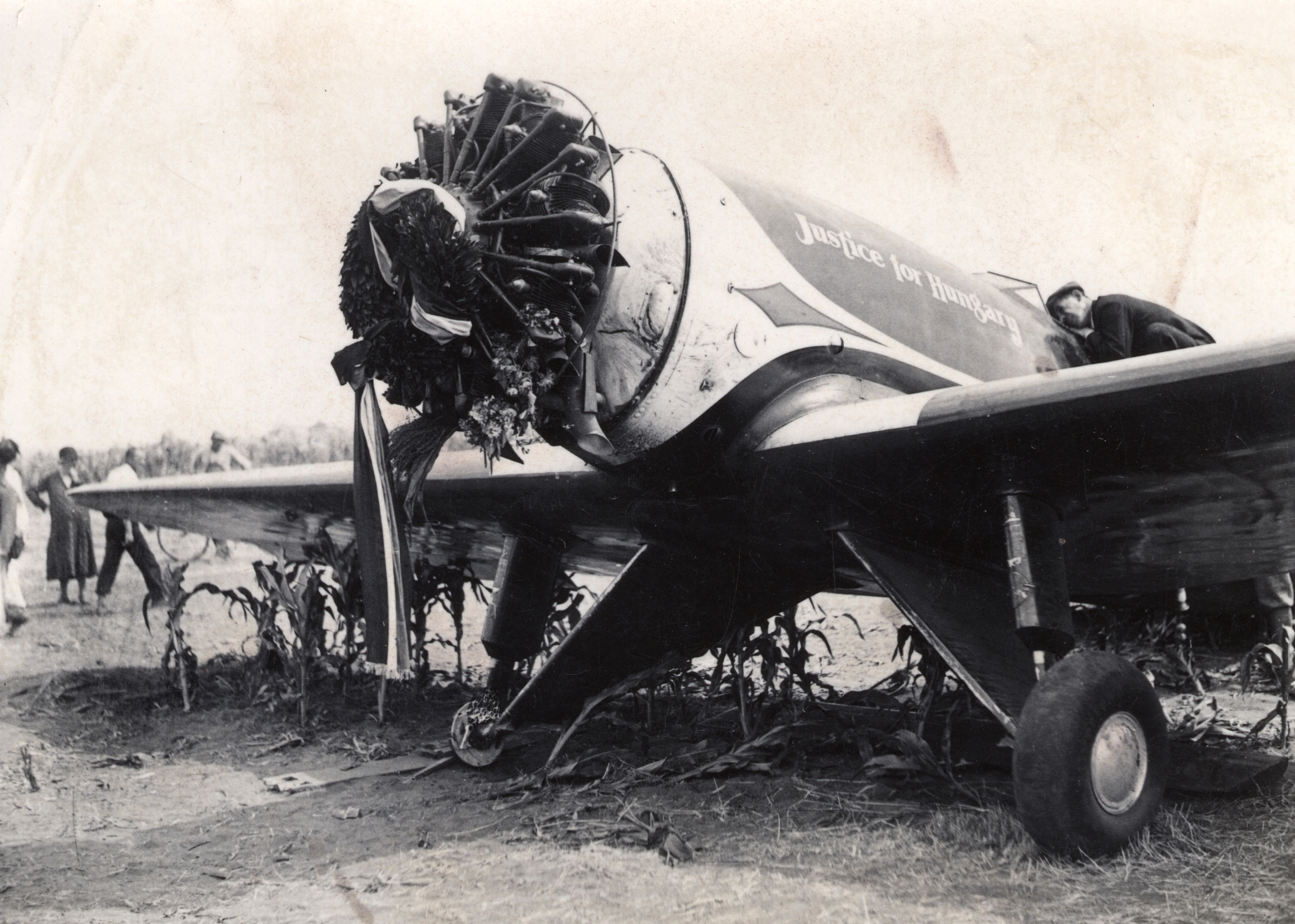 Endresz György és Magyar Sándor "Justice for Hungary" repülőgépe Bicskétől nem messze, Felcsút határában, egy kukoricatáblában a kényszerleszállás után.